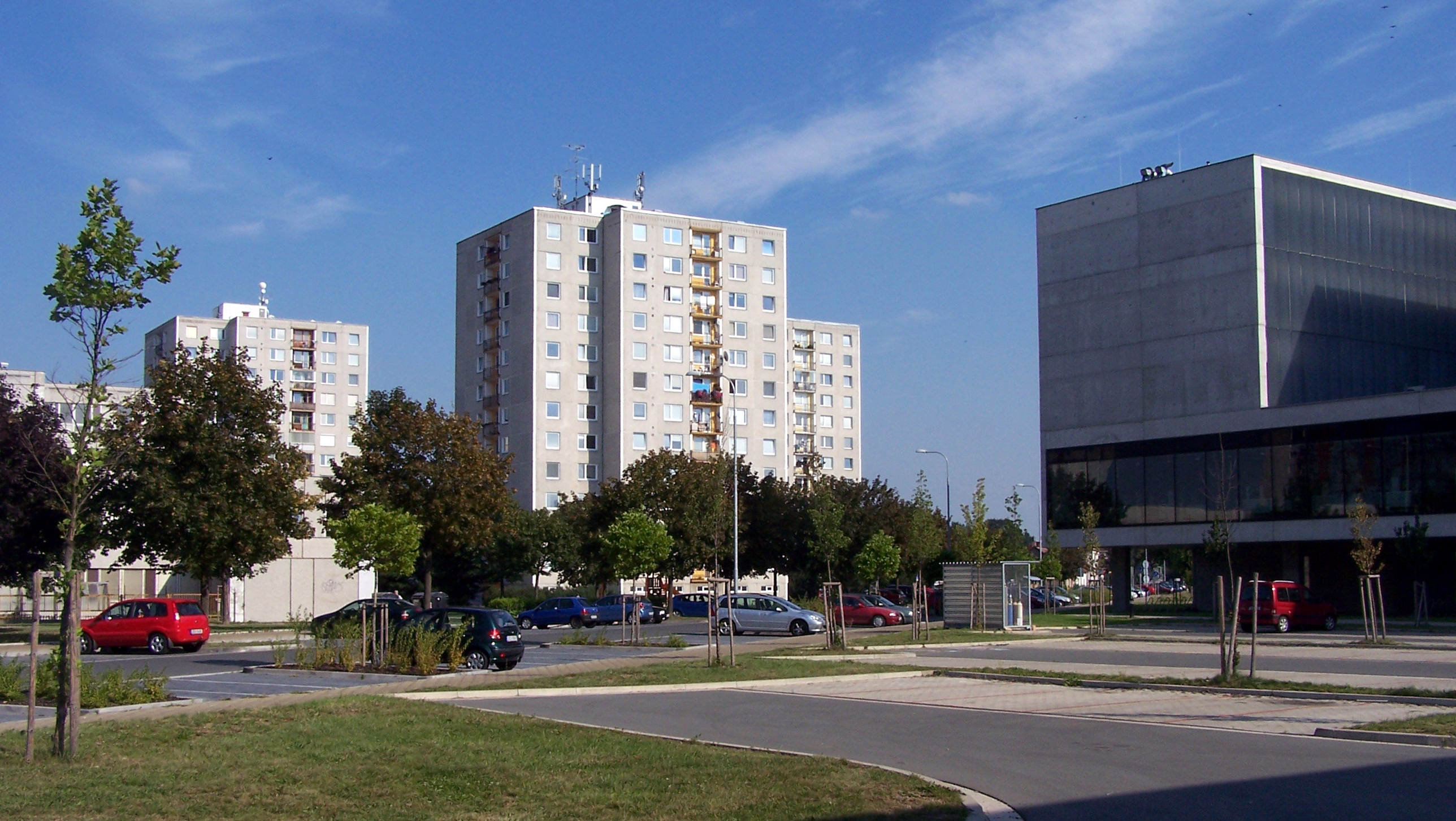 Sídliště Cihelna a vpravo nová budova Fakulty chemicko-technologické. GPS: 50°3'1.286"N, 15°46'4.020"E